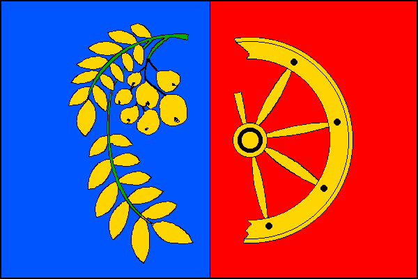 vlajka obce Zlámanec